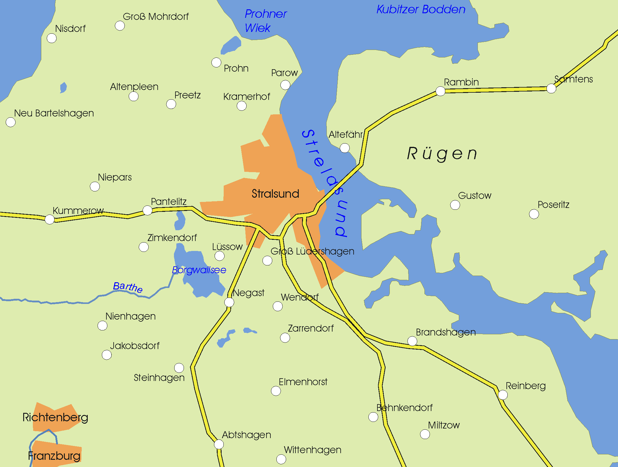 Borgwallsee bei Stralsund, Mecklenburg-Vorpommern